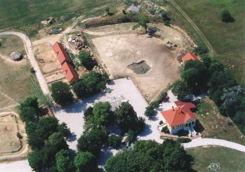 Balatonederics.